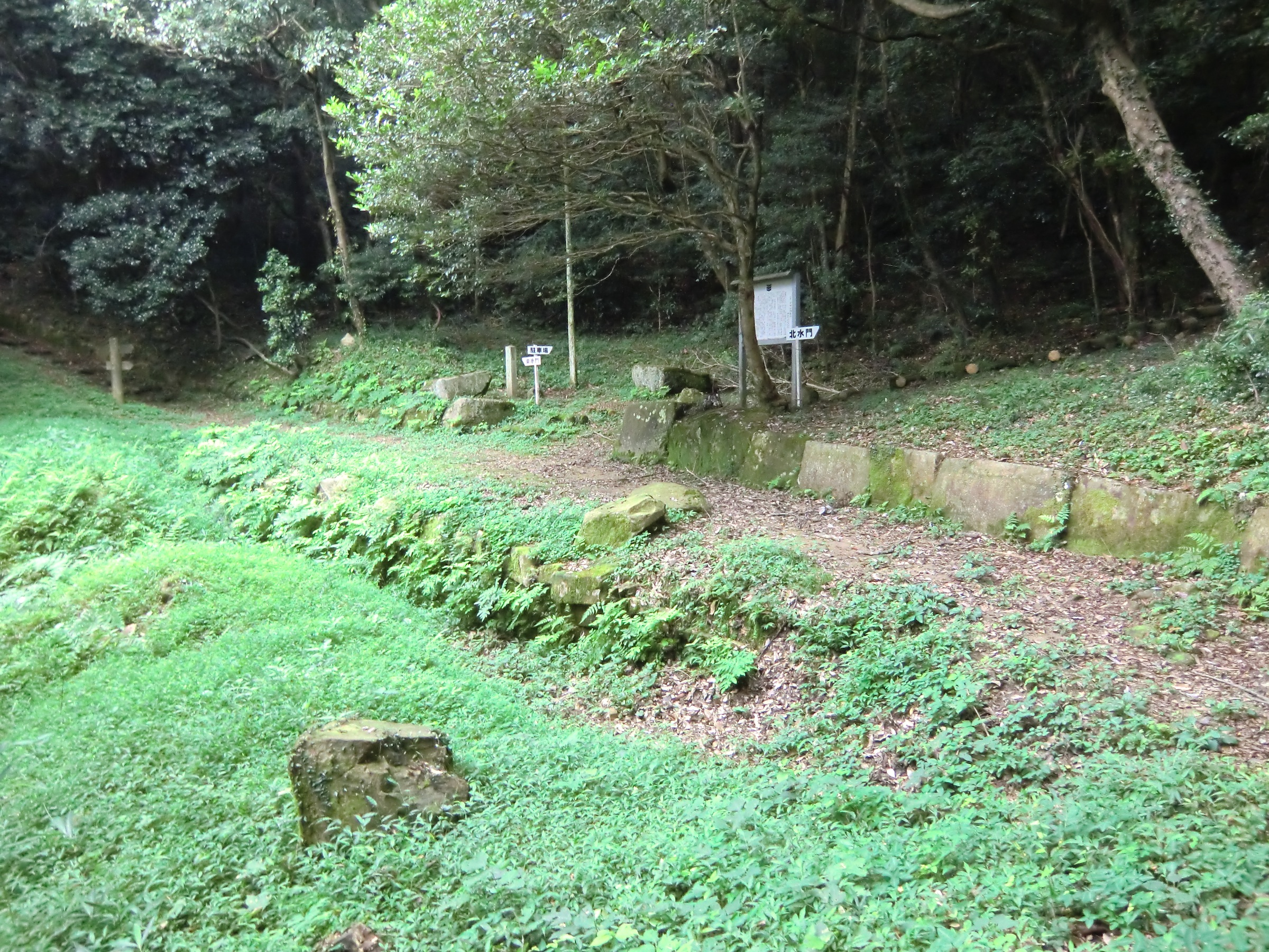 石城山神籠石（光市）の北門跡